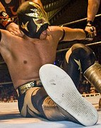 Súper Nova en el ring.